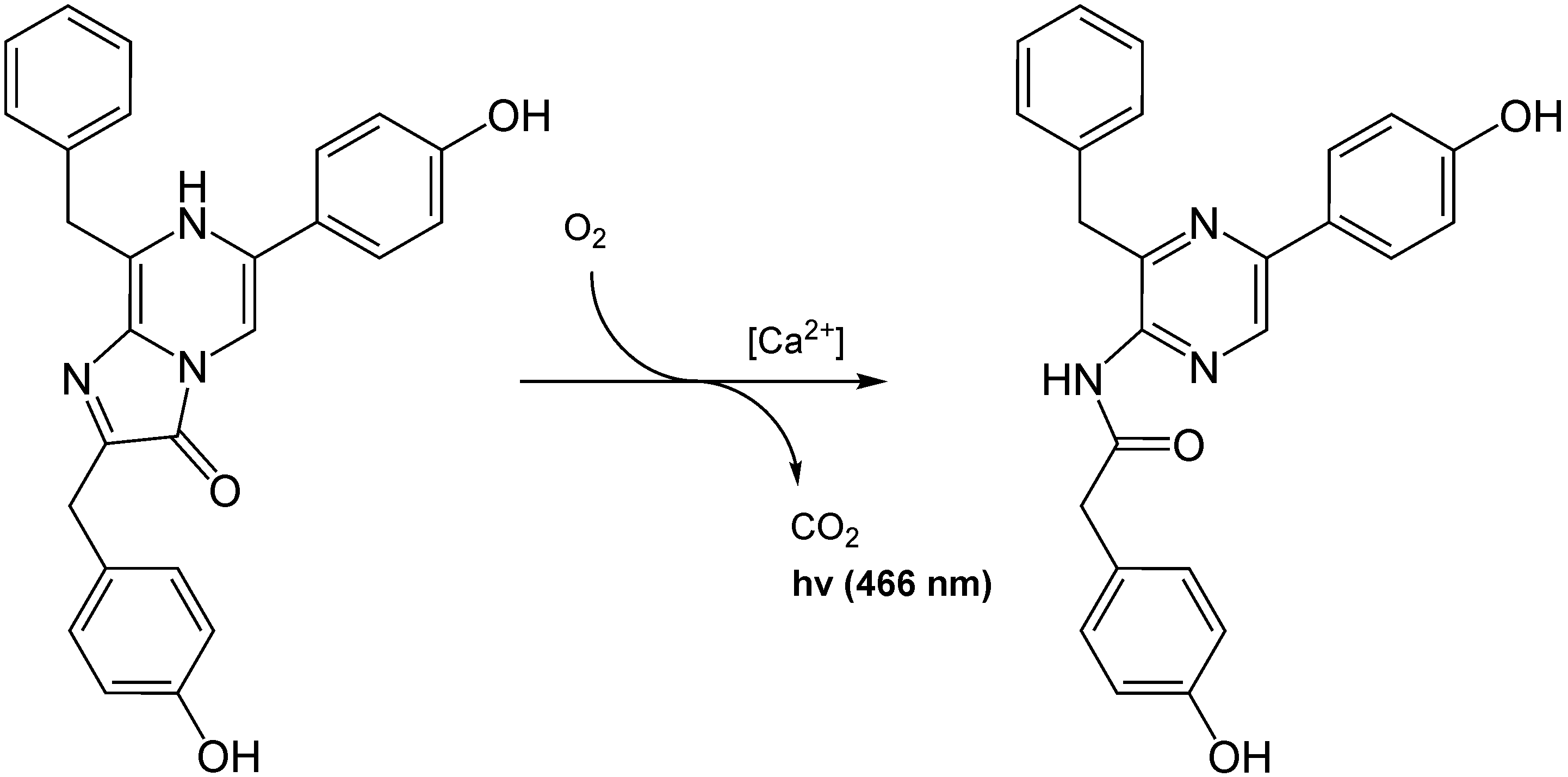 Coelenterazin wird zu Coelenteramid durch Aequorin abgebaut